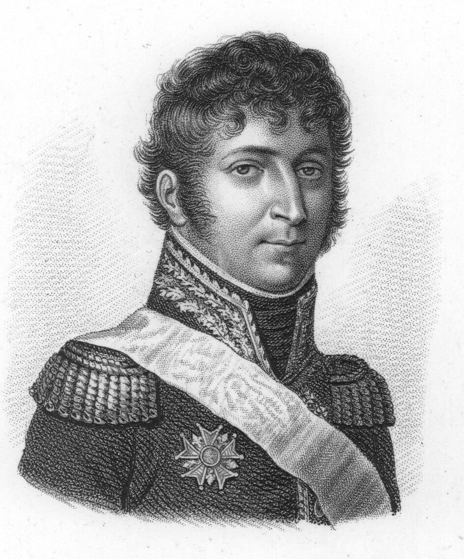 Olivier Macoux Rivaud de la Raffinière, général de division et baron de l'Empire (1766-1839).